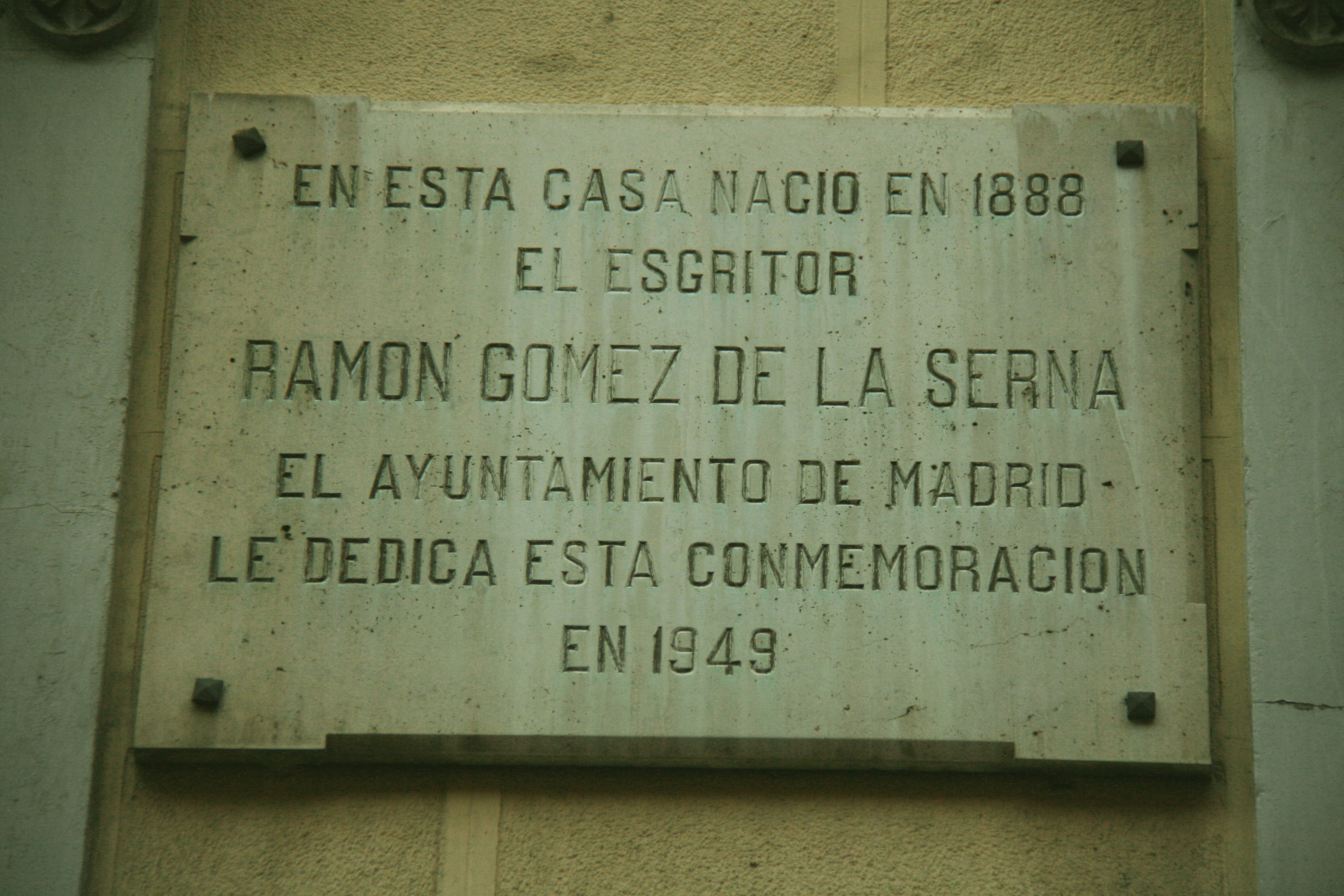 Placa de nacimiento en la calle de las Rejas (en la actualidad número siete de la calle Guillermo Rolland)